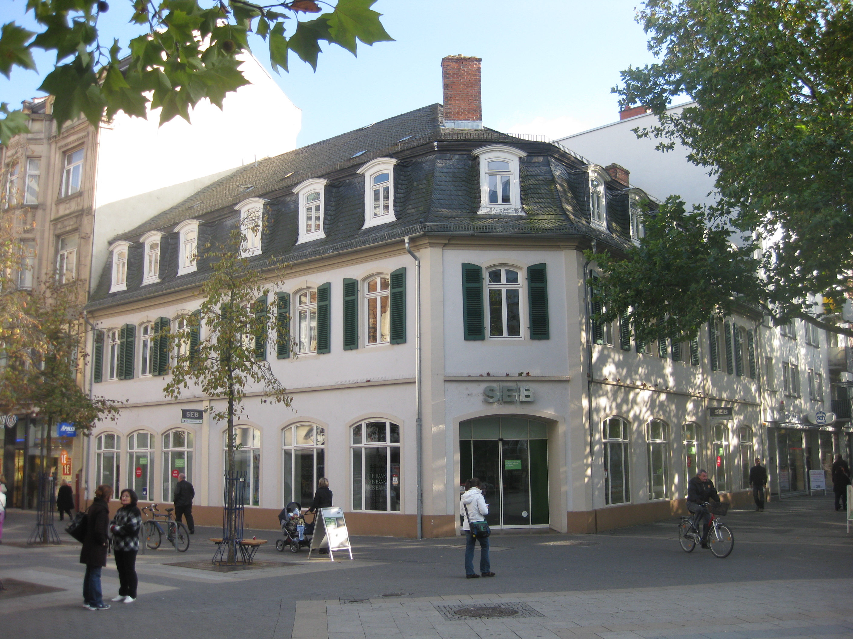 Haus aus der Hugenottenzeit mit Mansarddach in Offenbach am Aliceplatz Ecke Frankfurter Straße 32. Seit dem Tod des Fürsten Wolfgang Ernst II. (1735-1803) im Jahre 1803 lebte in diesem Alt-Fürstin genannten Haus als seine Witwe Ernestine Esperanzia Viktoria (1756-1819), die 1783 den verwitweten und kinderreichen 48-jährigen Offenbacher Landesherrn als 27-jährige Tochter des Fürsten Heinrich XI. von Reuß-Greiz heiratete. Sie blieb den Offenbacher Bürgern als eine Wohltäterin mit sozialem Engagement von ungewöhnlichem Umfang in den napoleonischen Zeiten mit Kriegswirren und Hungersnöten in Erinnerung. Das Haus steht unter Denkmalschutz. Die schwedische SEB-Bankengruppe verkaufte ihre Bankfilialen an die Santander-Bankengruppe, die jetzt hier die Bankfiliale betreibt.